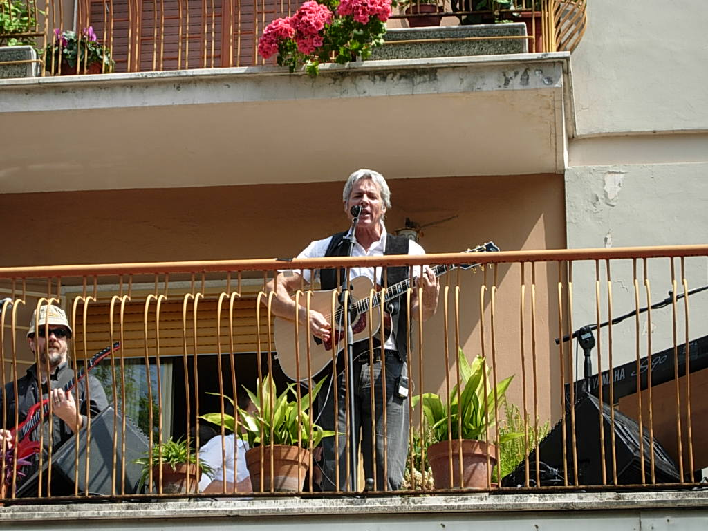 Baglioni canta da un balcone di Centocelle Foto personale